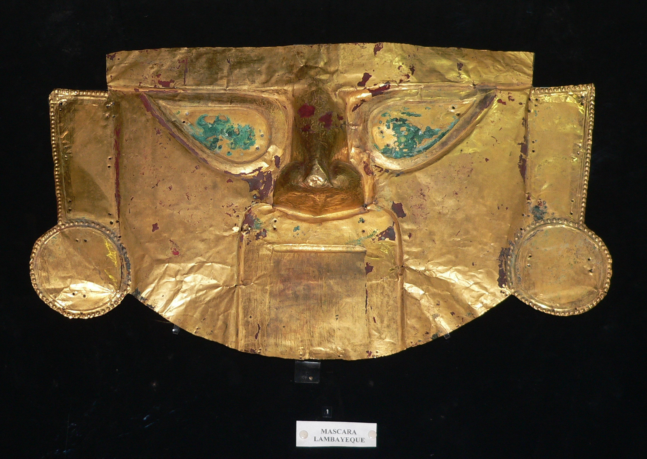 Descripción: Máscara de oro Cultura: Lambayeque (Sican) Fundación: Fundación Miguel Mujica Gallo Museo: Museo Oro del Perú y Armas del Mundo Lugar: Lima, Perú Fotógrafo: © Manuel González Olaechea y Franco Fecha : 13 de julio de 2007